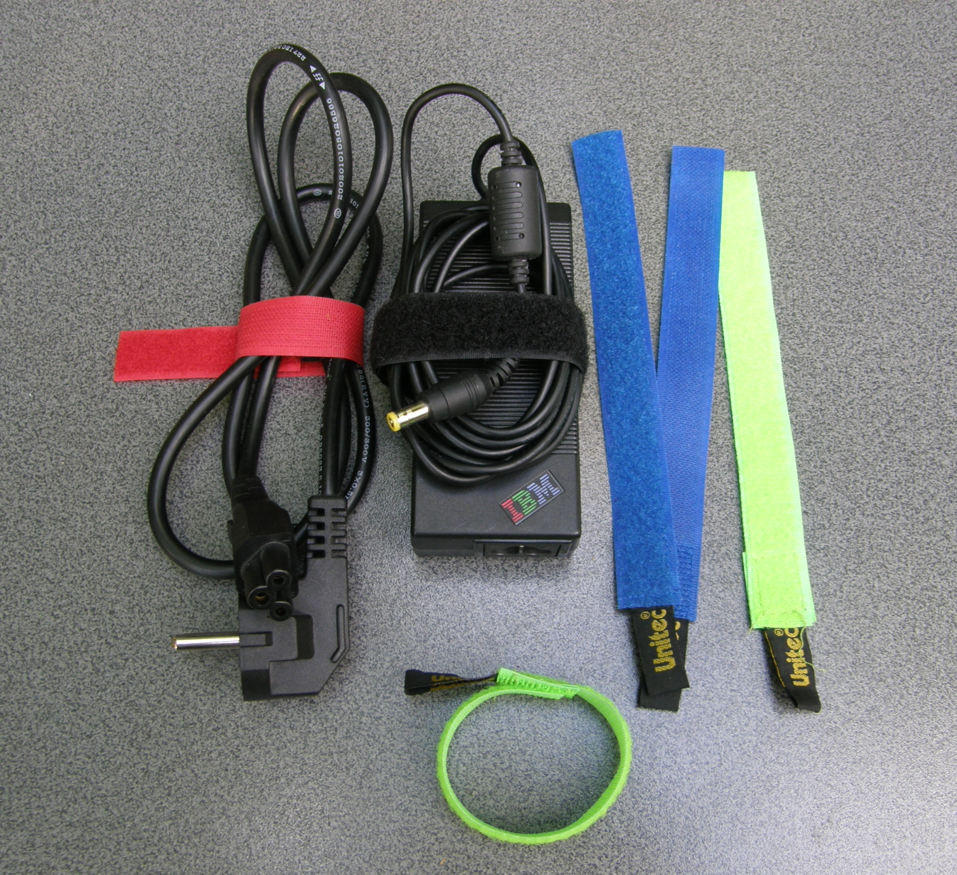 Kabelbinder mit Klettverschluss, an einem Netzteil mit Anschlußkabel für ein (IBM)-Notebook